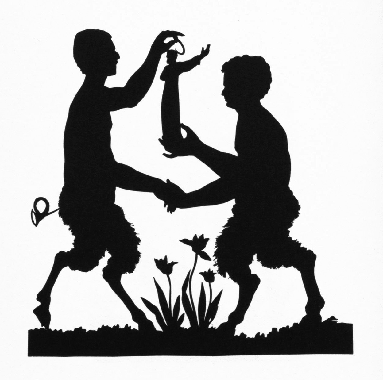 Luise Duttenhofer: Heinrich Rapp, den Ruhm seines Schwagers Dannecker als Schöpfers der Christus-Statue verkündend, schwarzer Scherenschnitt, nach 1820.